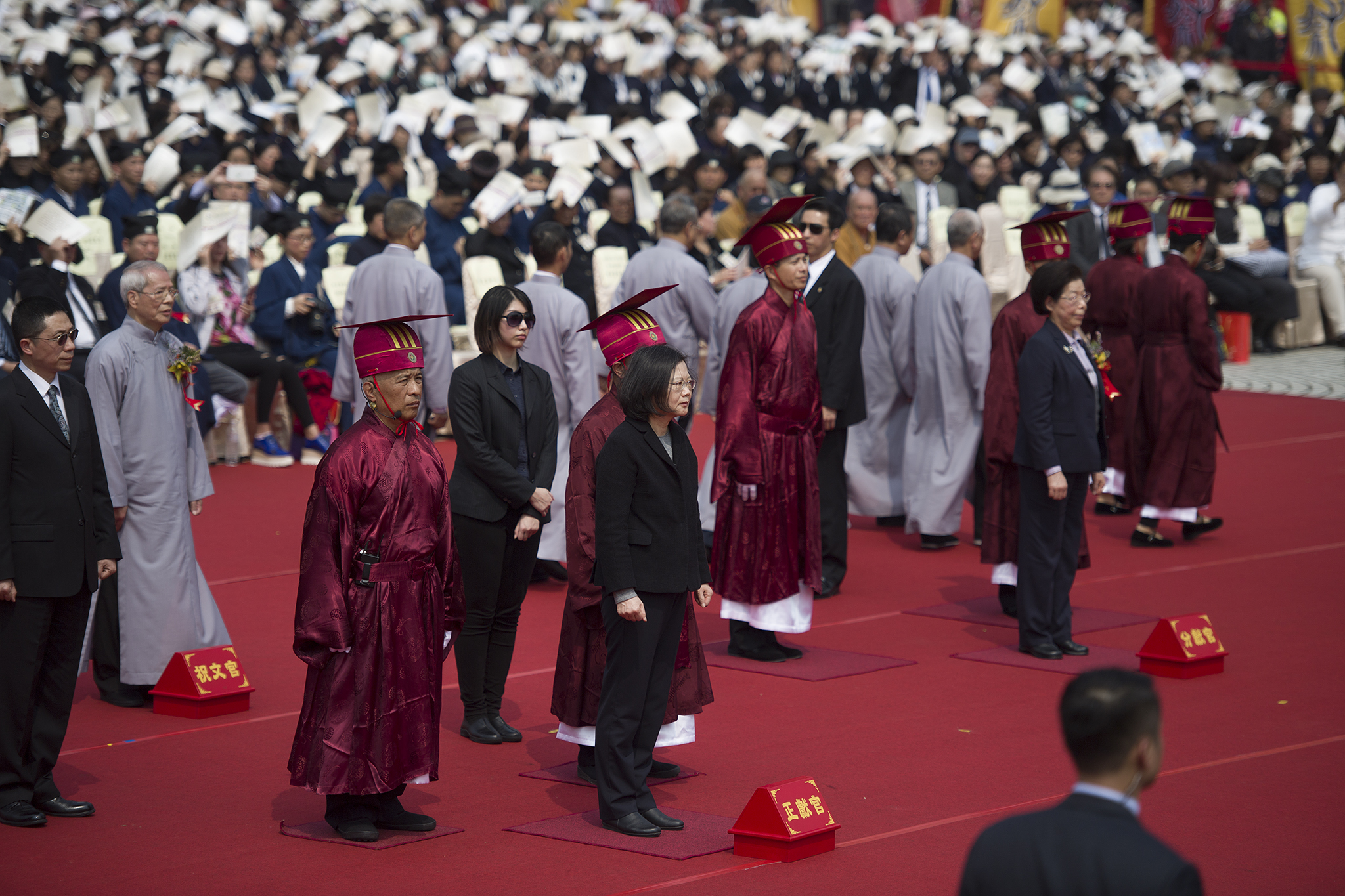 中華民國總統蔡英文出席一貫道萬民祭天祈福大典，行國家祭祀禮及初獻禮，並獻香、獻帛、獻爵，為台灣祈福。